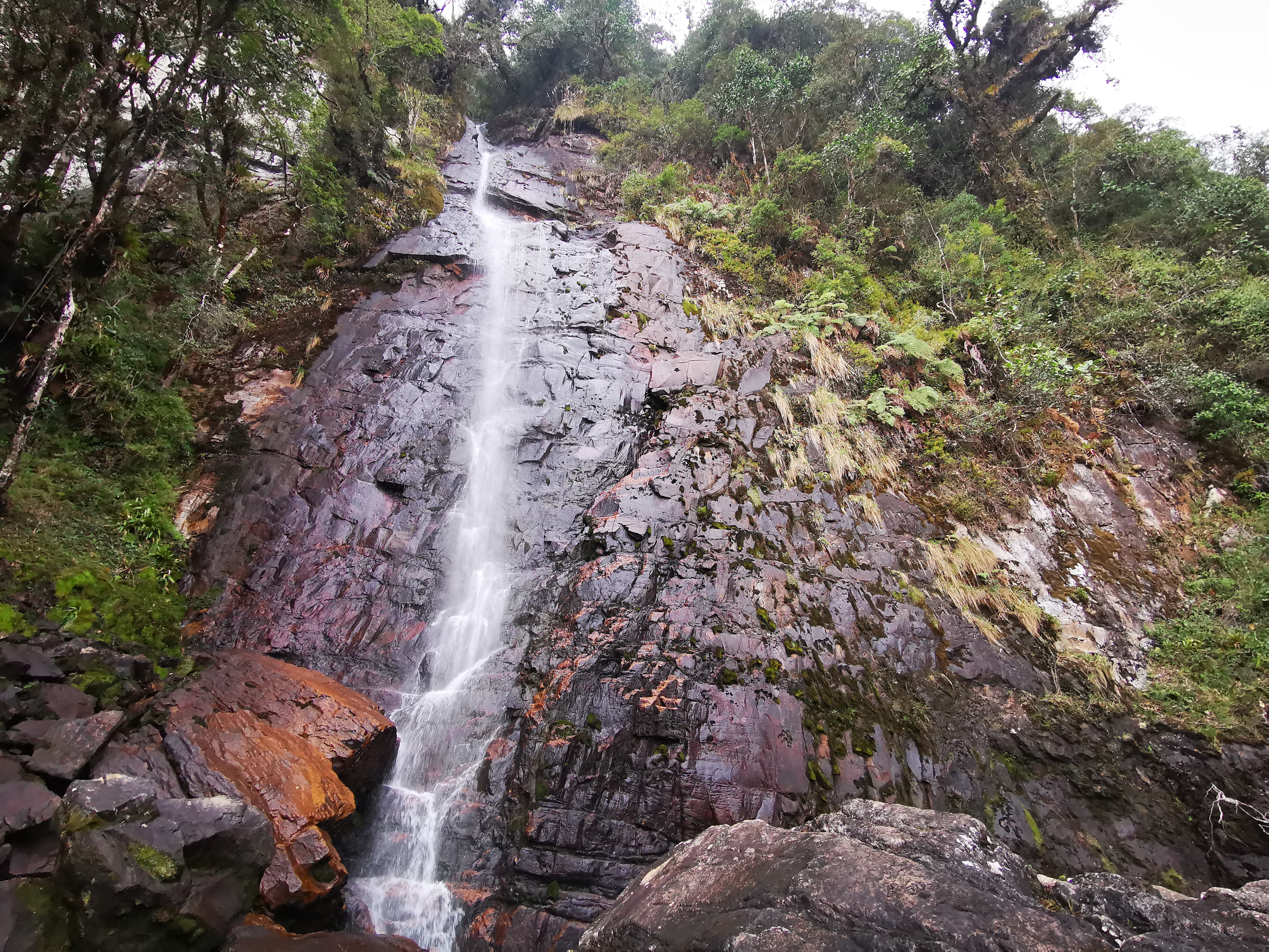 Cascada Vda Salitre en el municipio de Gutiérrez Cundinamarca